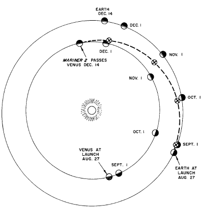 Mariner 2 heliocentric trajectory